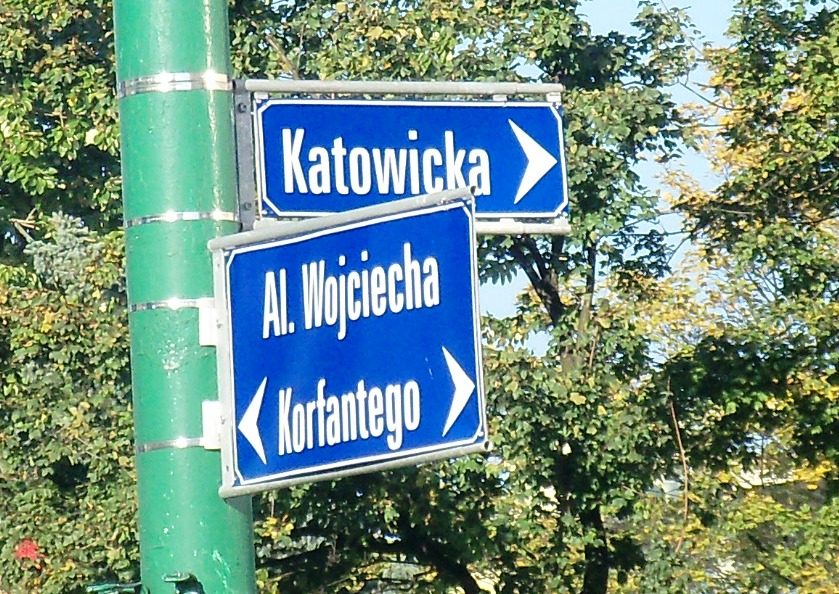 Znak na skrzyżowaniu alei Wojciecha Korfantego i ulicy Katowickiej w mieście Katowice